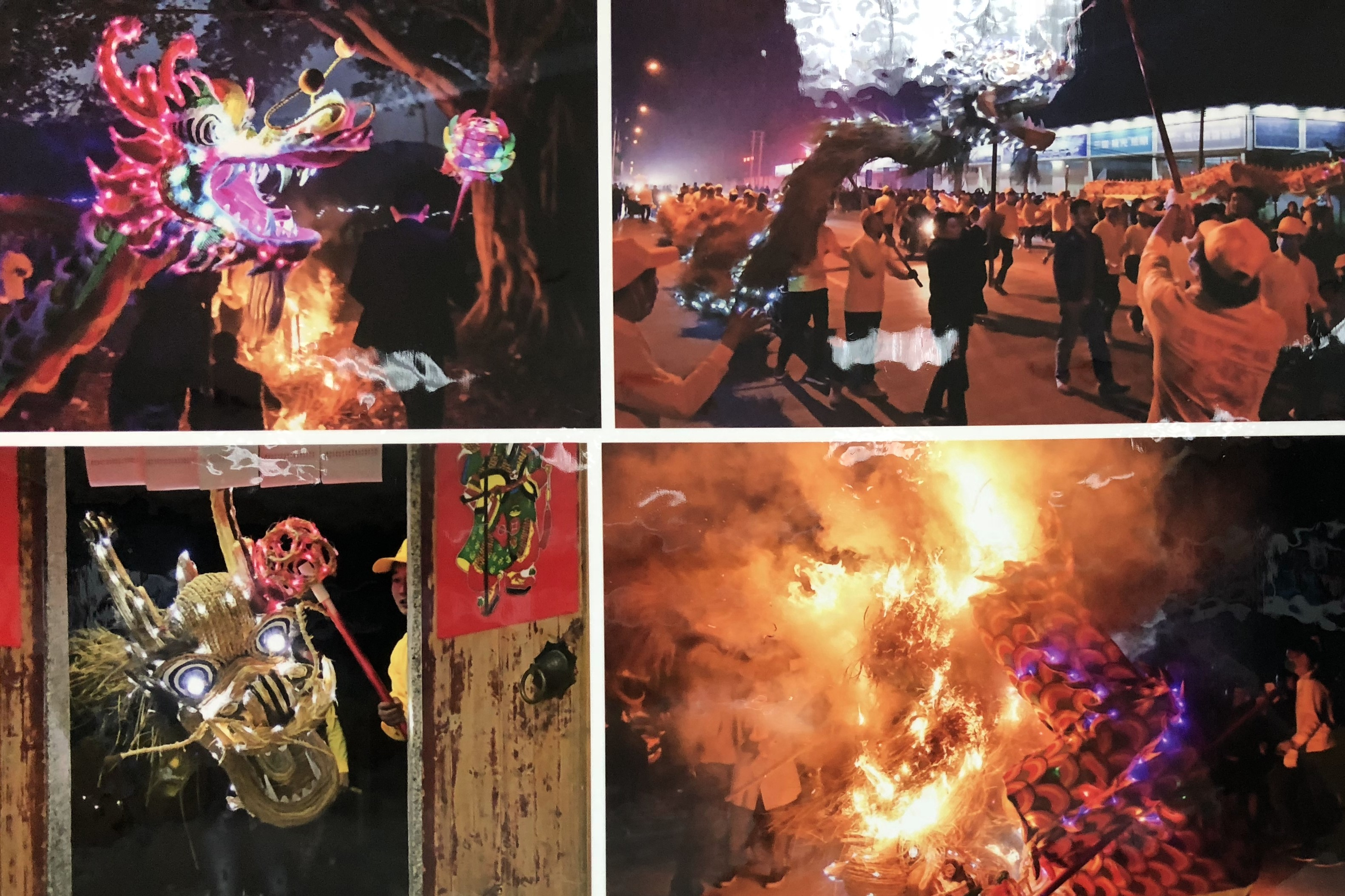 中文（中国大陆）: 埔仔舞火龙